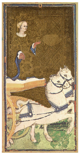 著作権切れ。Uncertain, probably between the 1440's and 1470's